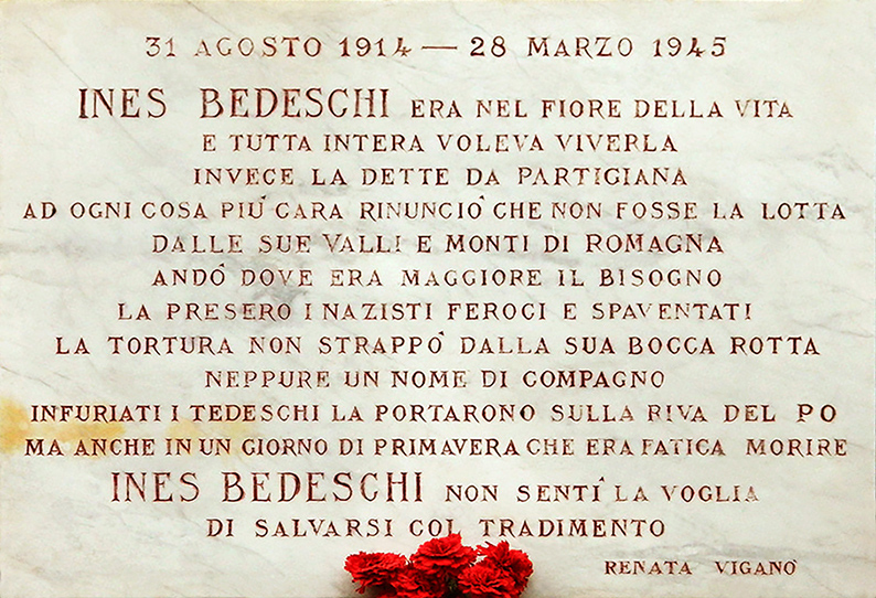 Lapide posta nel comune di Conselice in Corso Garibaldi. Il testo è stato redatto da Renata Viganò